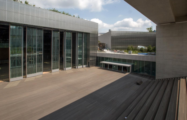 예술극장전경